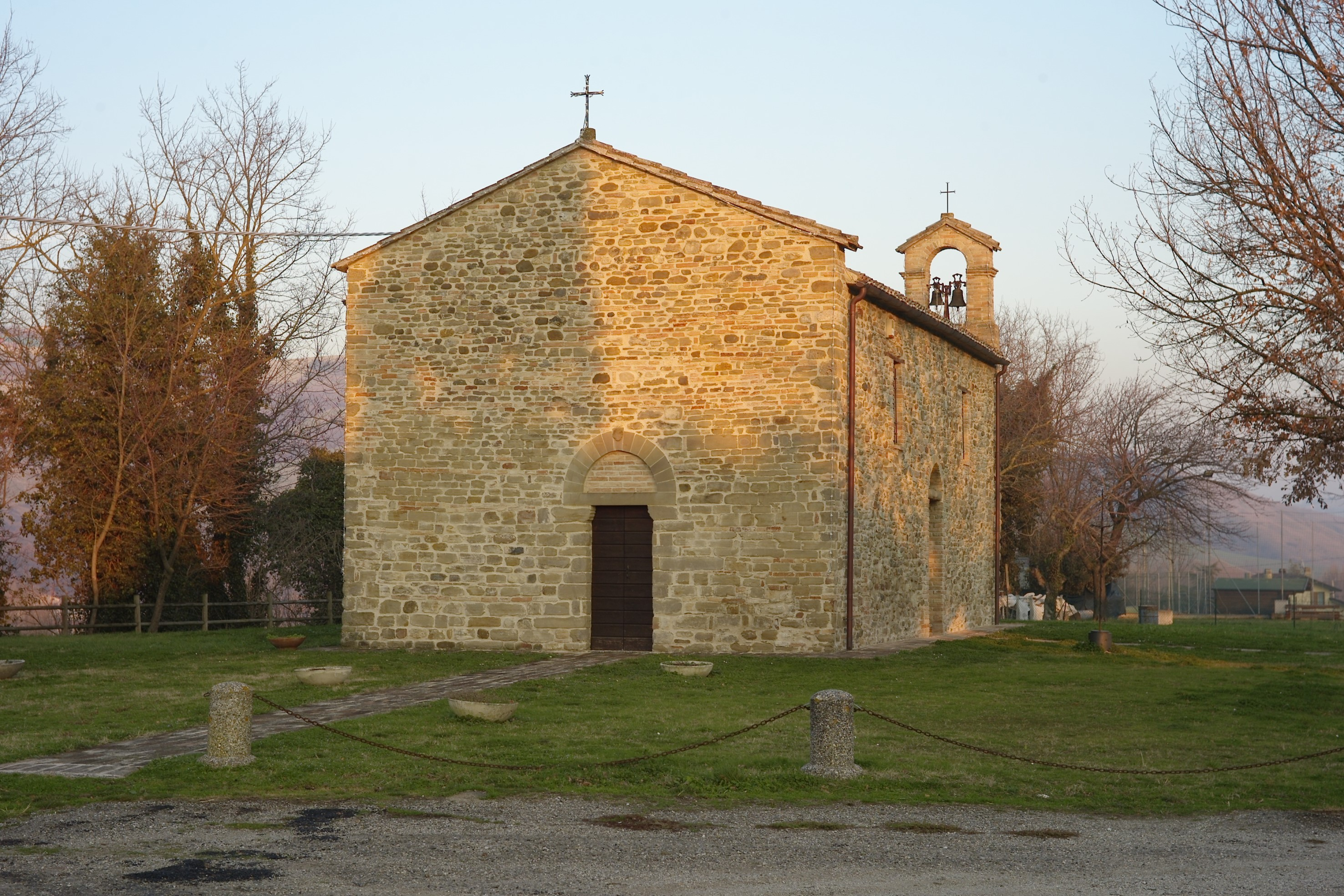 Veduta esterna della chiesa di San Paterniano di Ca'Mazzasette.